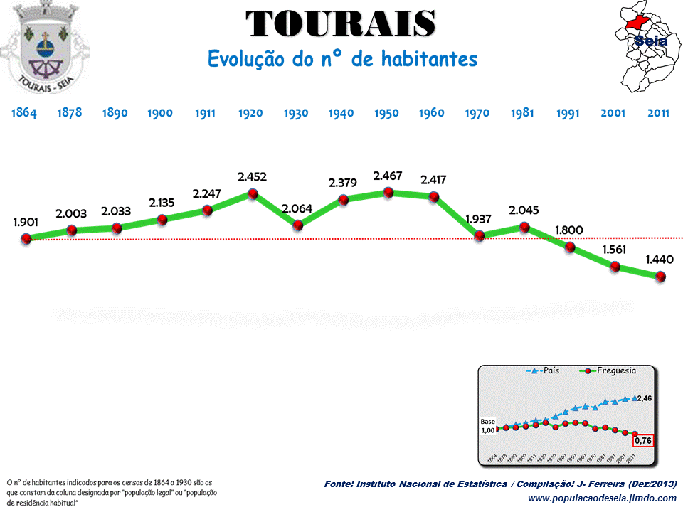 Evolução da População 1864 / 2011